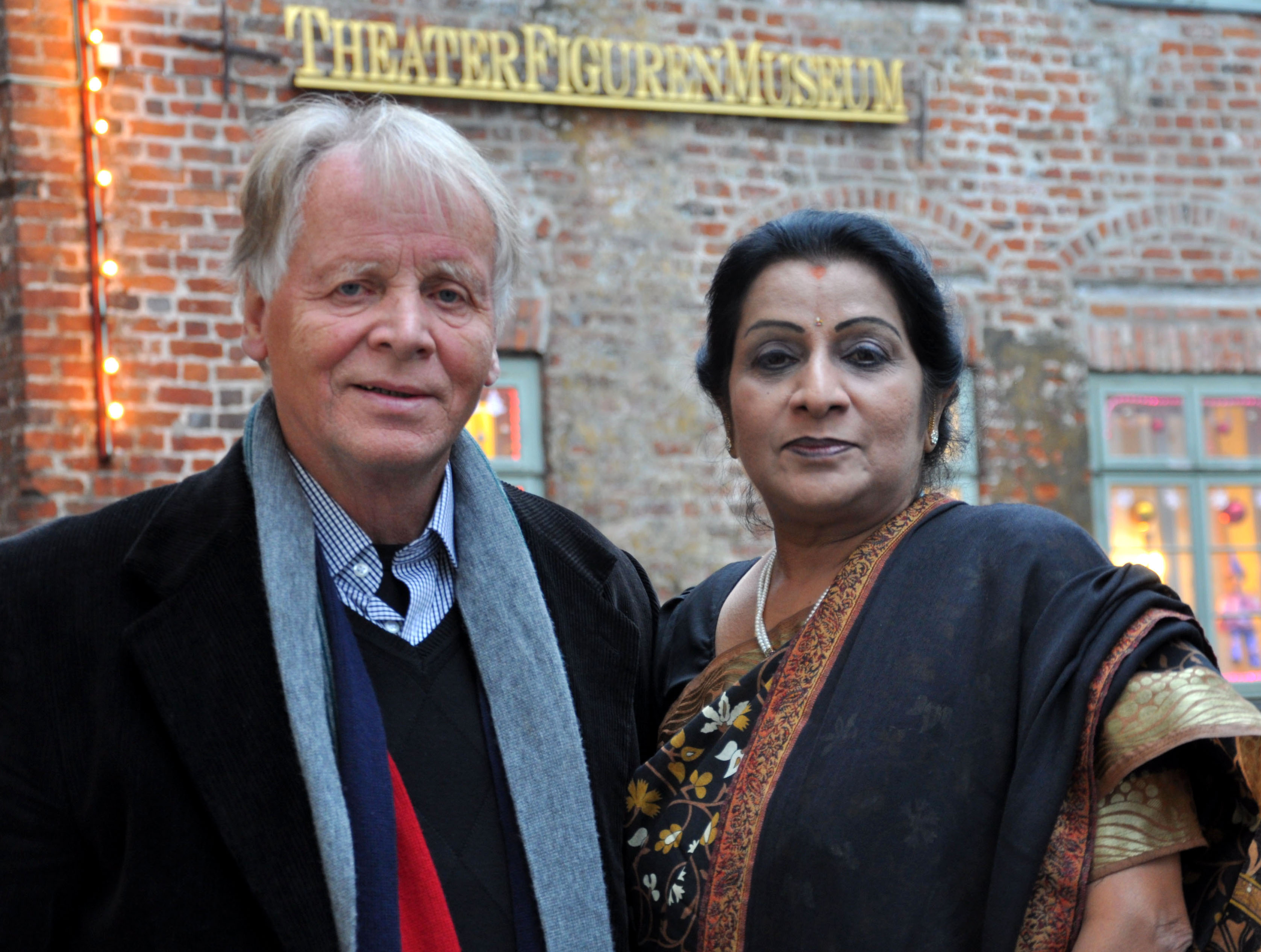 Fritz Fey